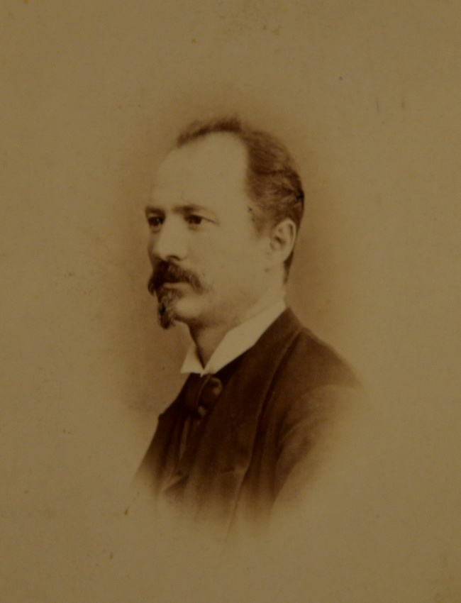 Carol Popp de Szathmary - Nicolae Grigorescu, deţinător Biblioteca Academiei Române, Bucureşti.